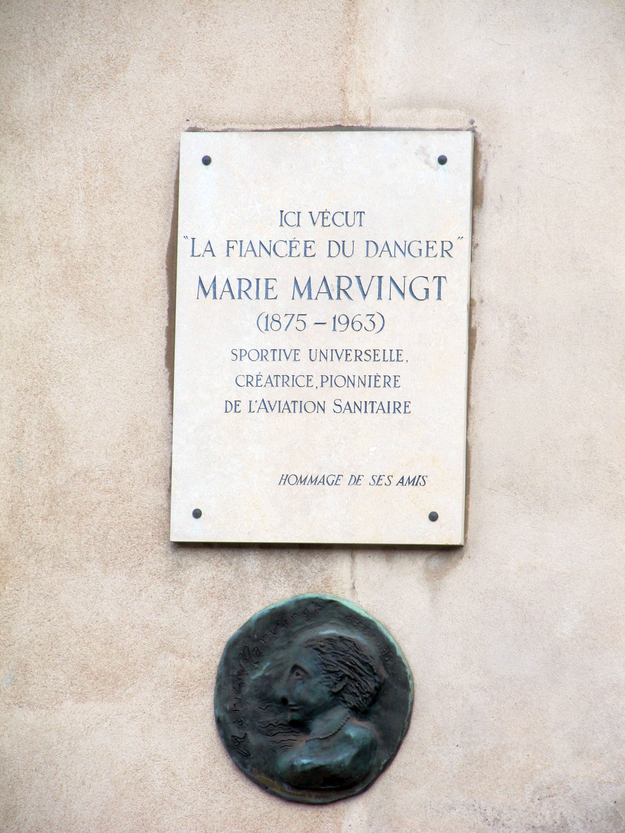 Plaque commémorative de Marie Marvingt - Place de la Carrière, Nancy